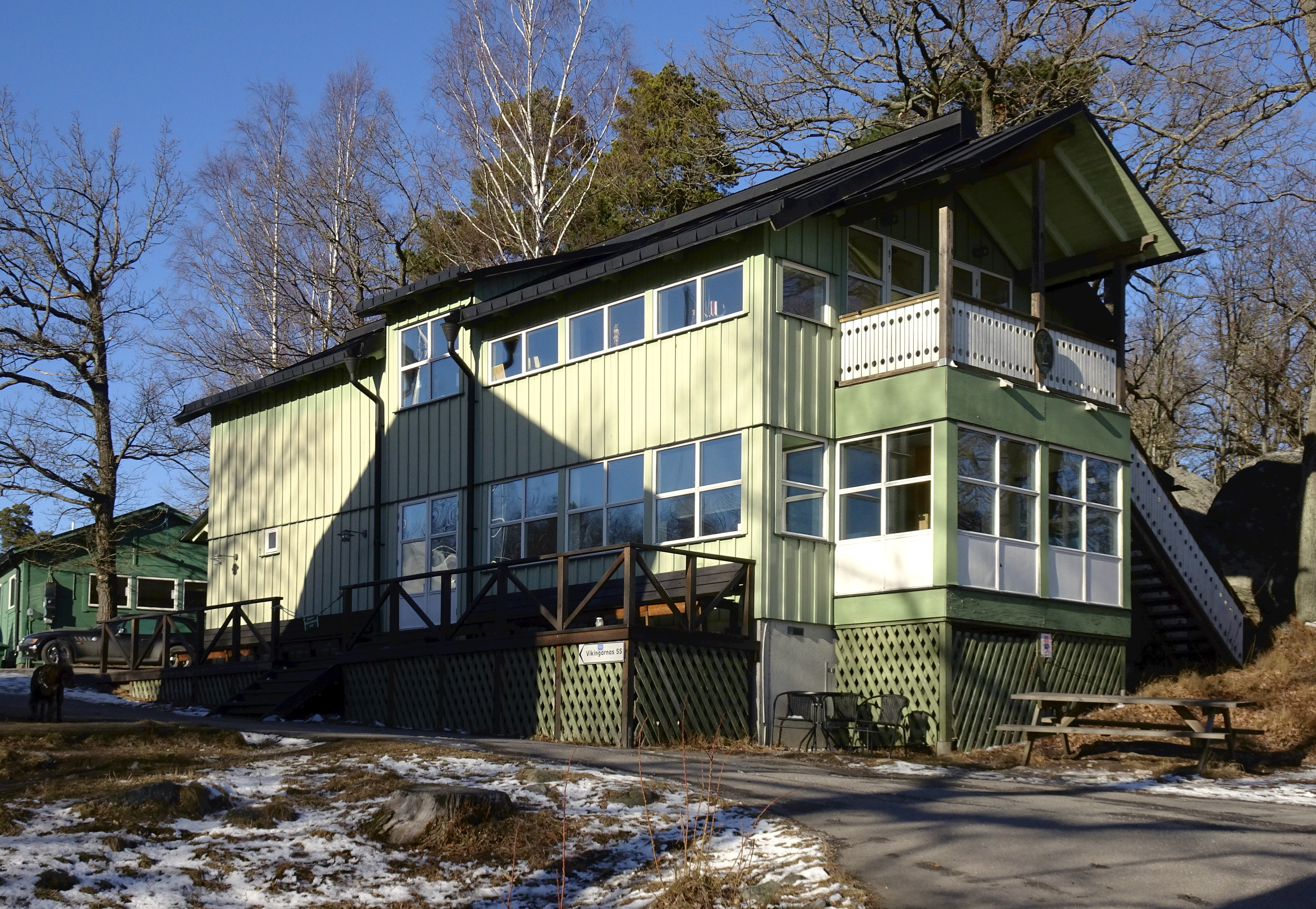 Klubbhuset för Vikingarnas Segel Sällskap (VSS) vid Hundudden